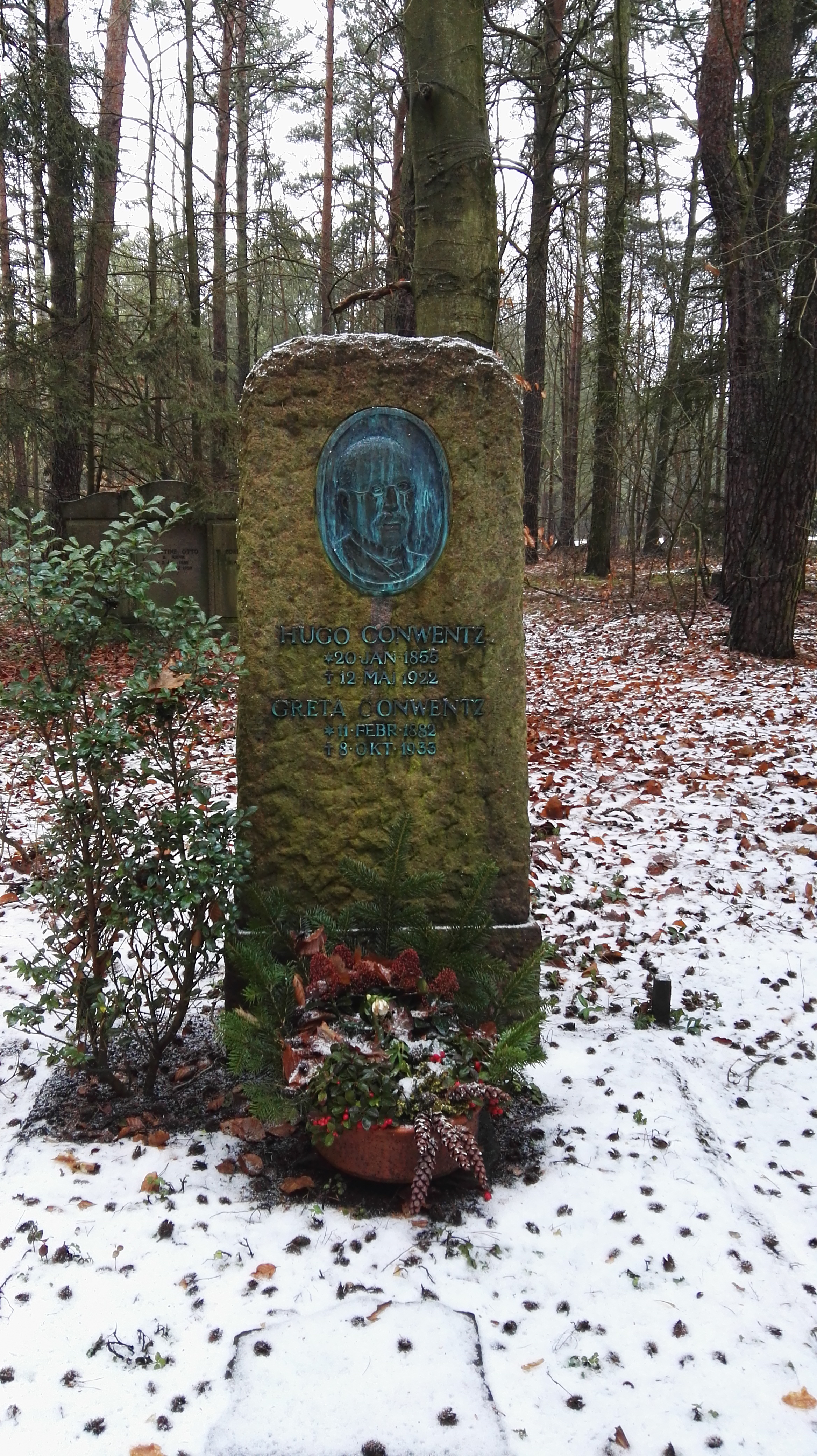 Grab von Hugo Conwentz auf dem Südwestkirchhof Stahnsdorf; ehemaliges Ehrengrab der Stadt Berlin